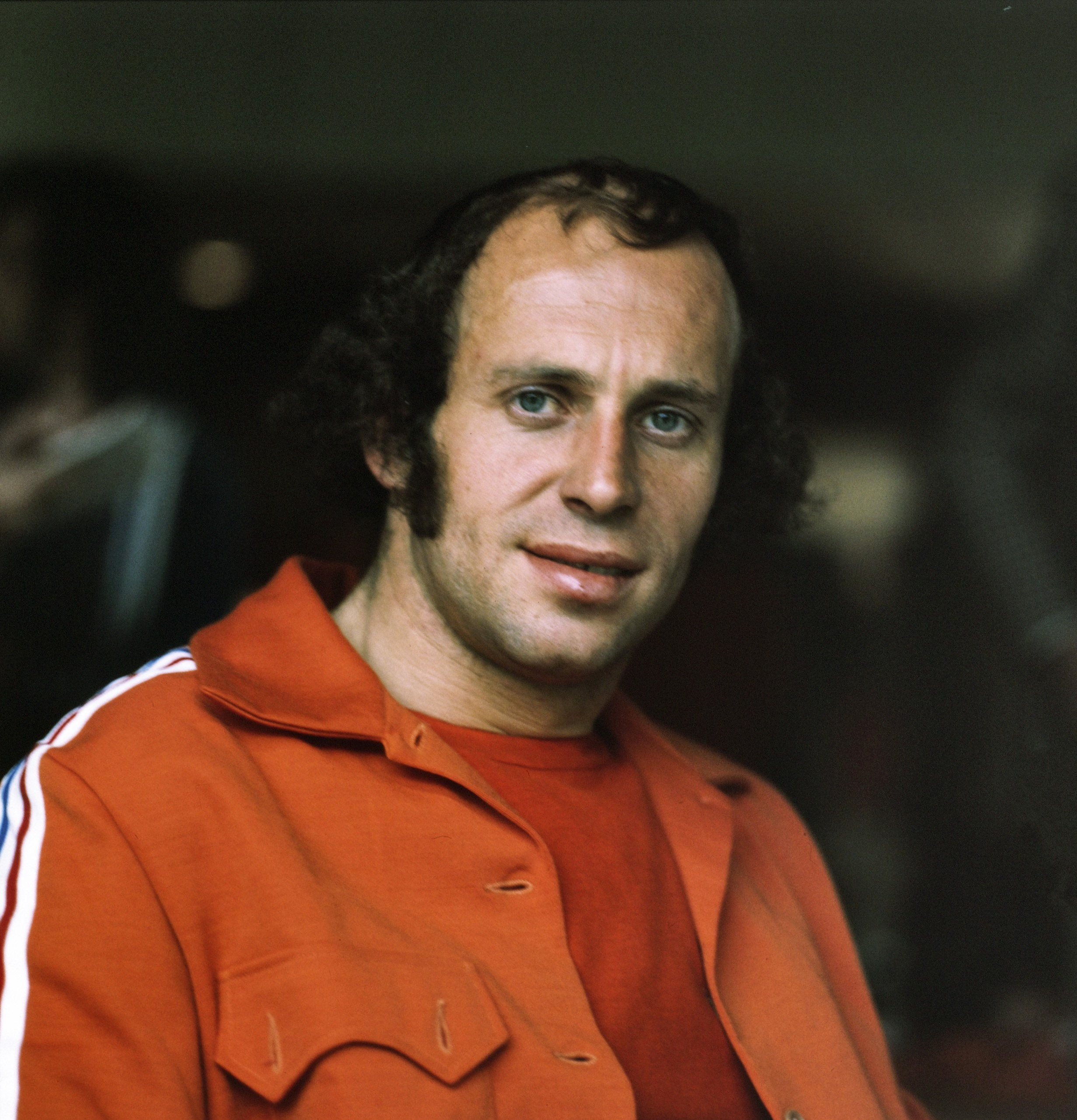 Eddy Treijtel